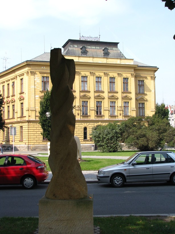 historická budova FF UHK